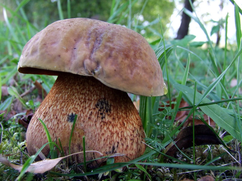 Boletus luridus. Dasiūnai, Kaunas district, Lithuania.